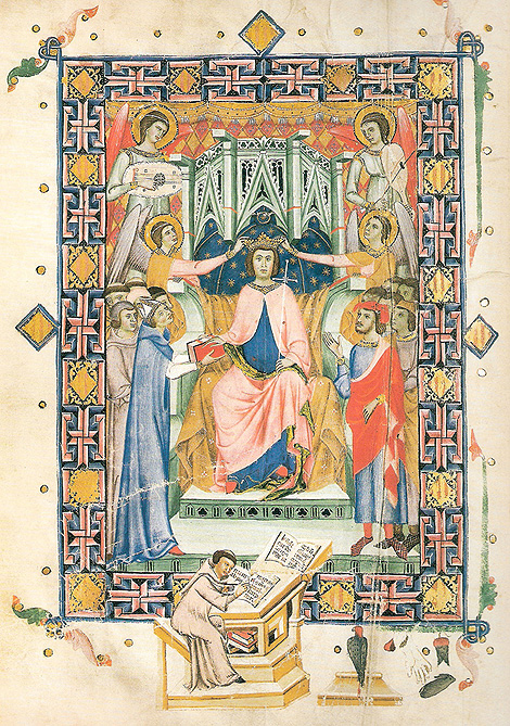 Jaume II de Mallorca jura els privilegis del regne de Mallorca el 1276. Miniatura pintada per Romeu Despoal (representat a baix) vers 1334 al Llibre de privilegis dels reis de Mallorca (Arxiu Històric Municipal de Palma)